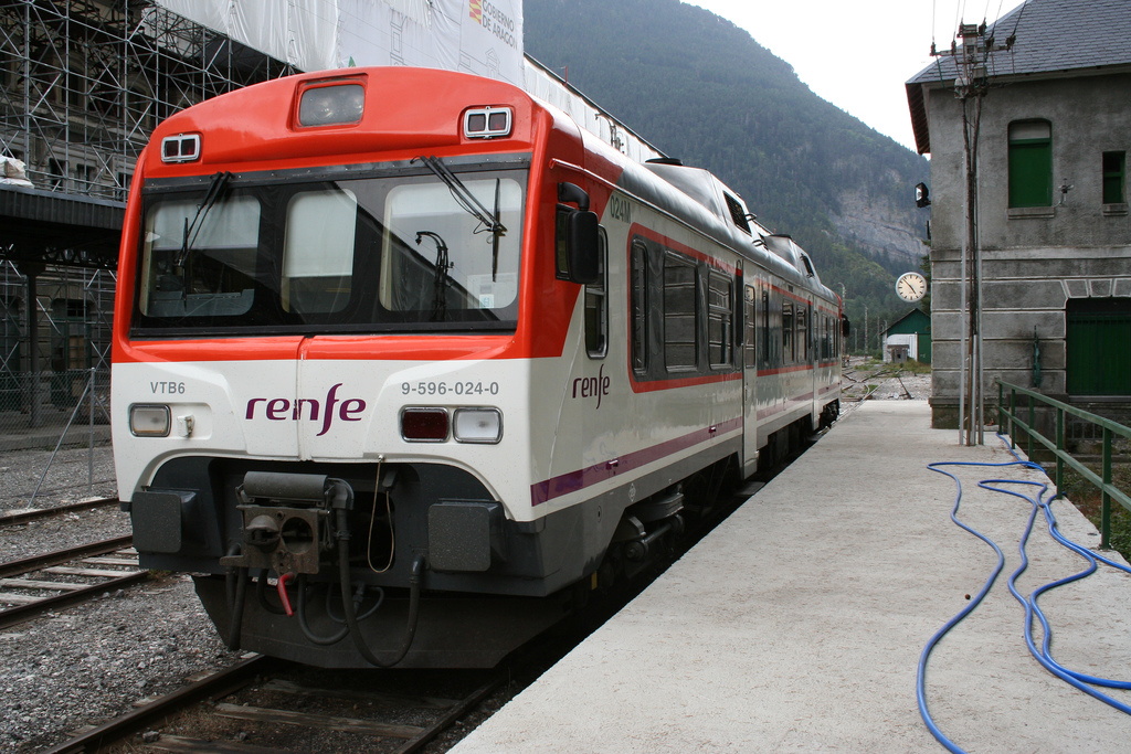 Serie 596 de Renfe en Canfranc